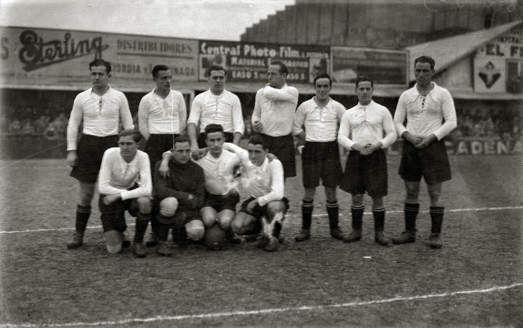 Título original: Partido de fútbol de la Real Sociedad y Real Unión en el campo de Atotxa (1/3) Localización: San Sebastián (Guipúzcoa)